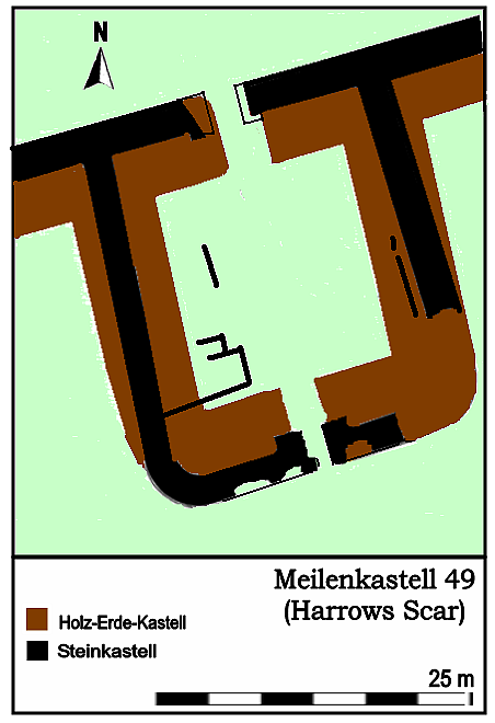 Befundplan des Meilenkastells 49 (Harrows Scar)